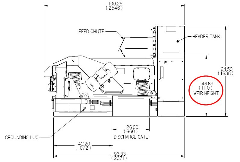 Высота перелива вибрационного сита